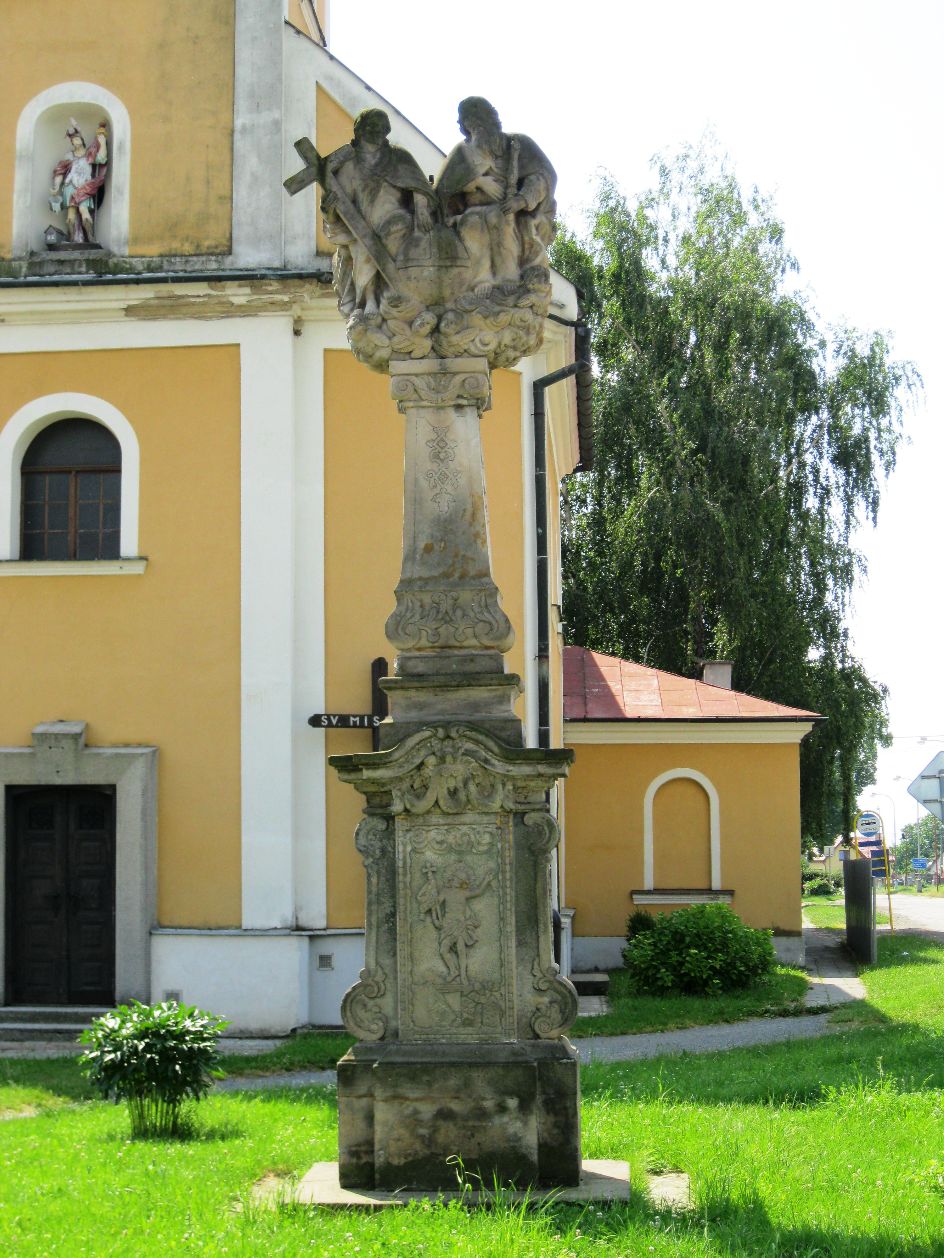 Sousoší Nejsvětější Trojice (Moravská Huzová), na návsi před kostelem sv. Floriána, Moravská Huzová